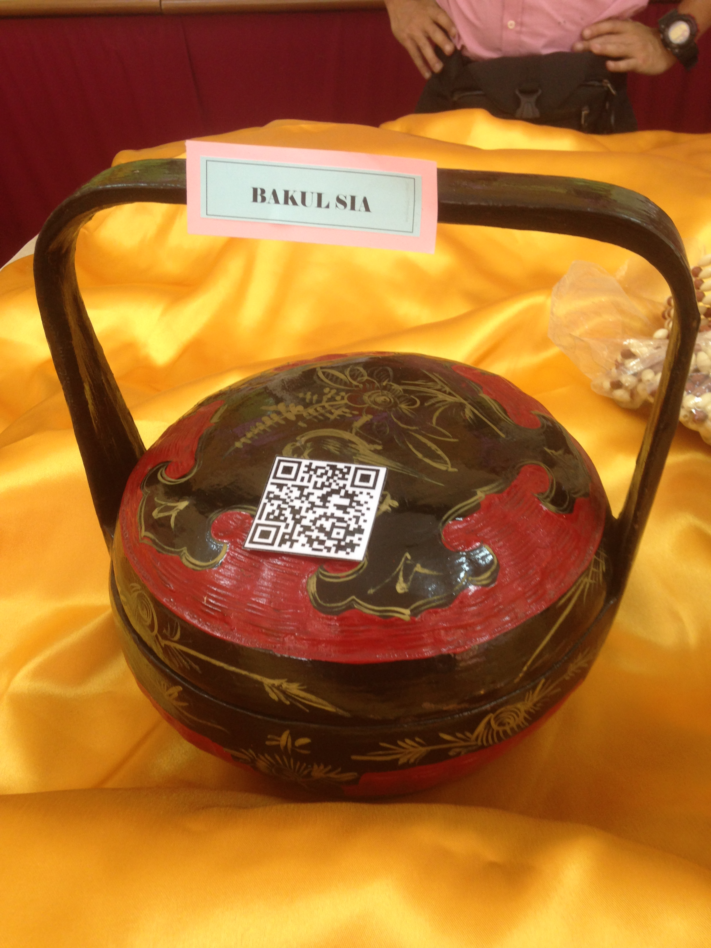 BAKUL SIAH